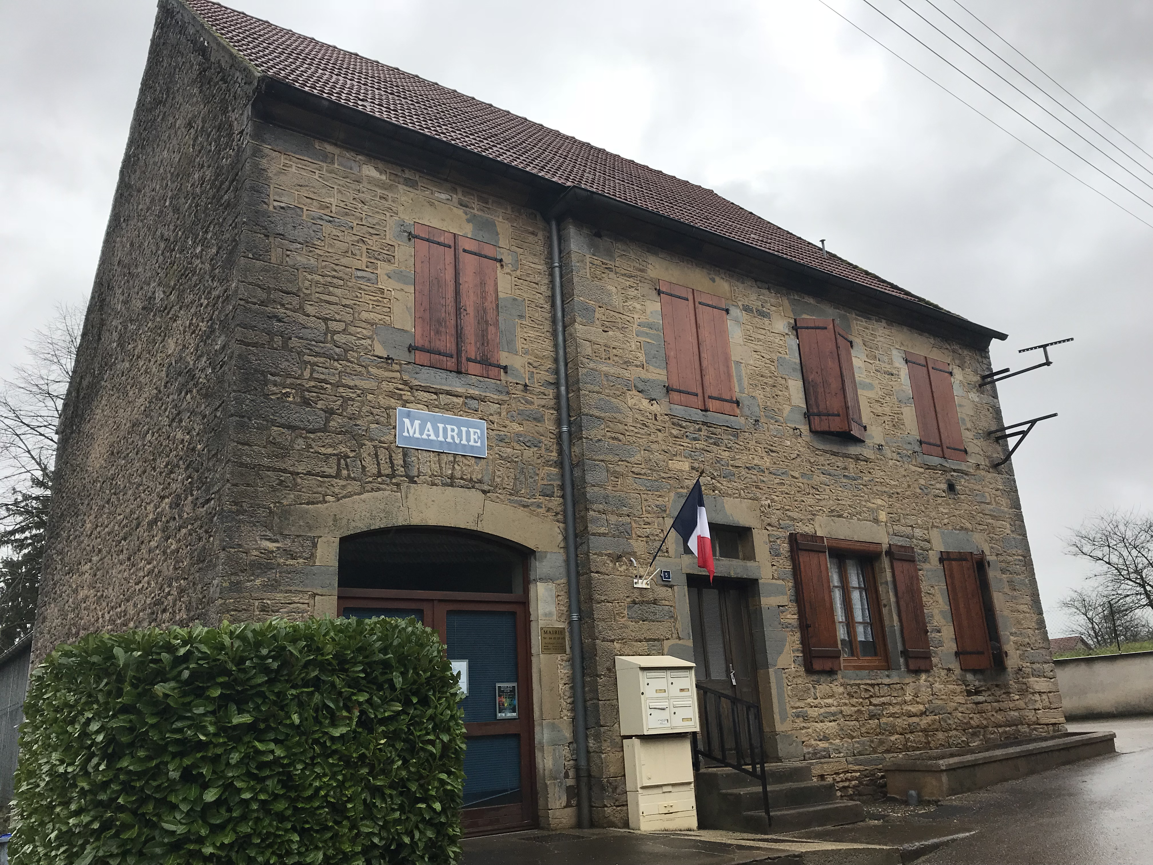 Serre-les-Moulières (Jura) en janvier 2018.